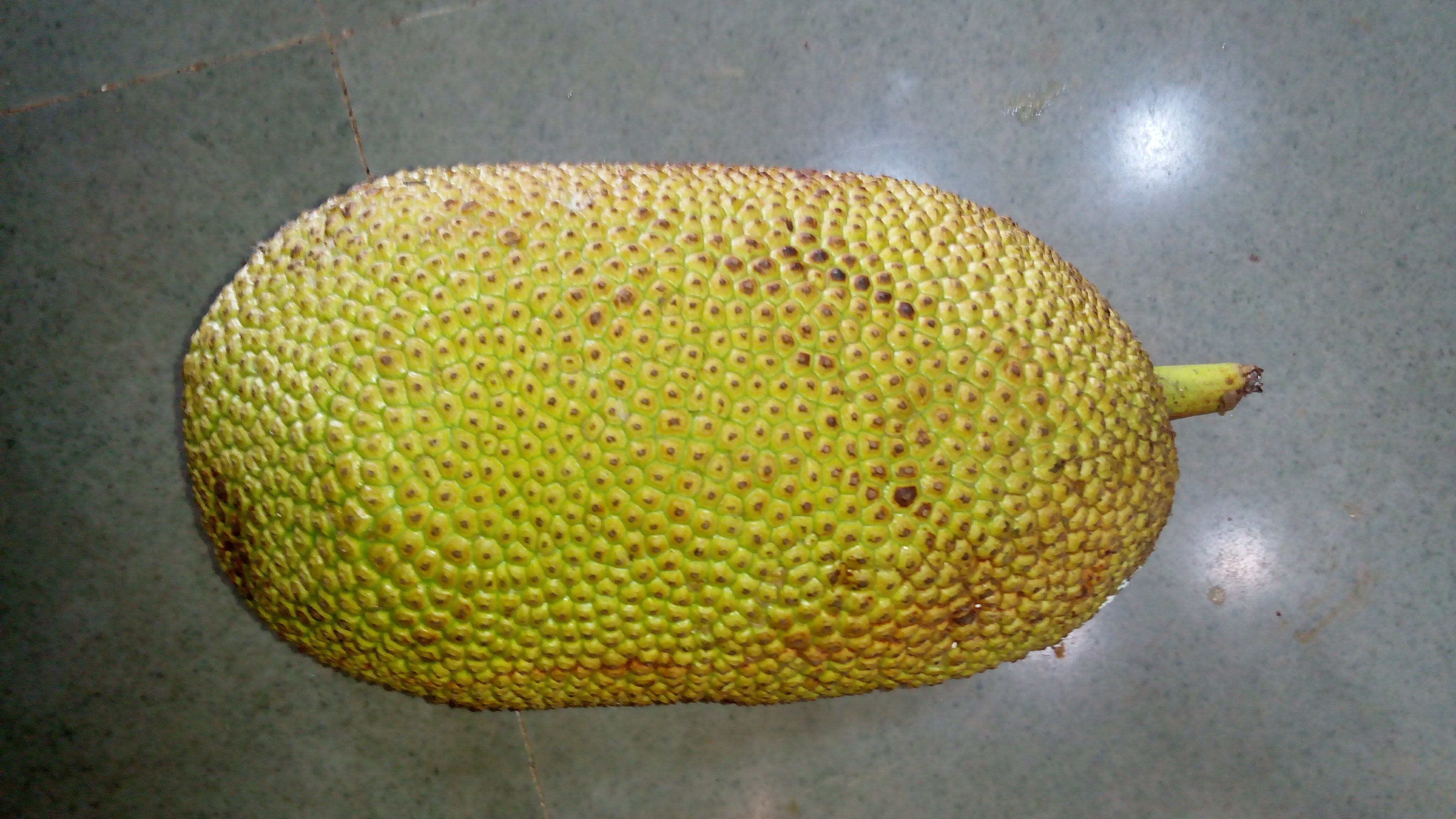 फणस फळ